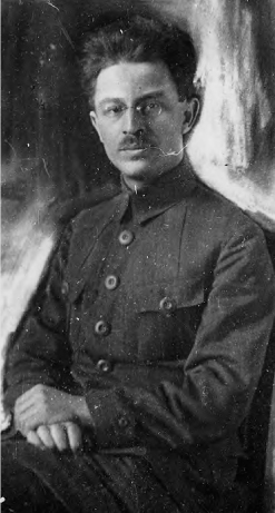 Склянский, Эфраим Маркович (1892-1925) - советский военный деятель Гражданской войны, ближайший сотрудник Льва Троцкого.